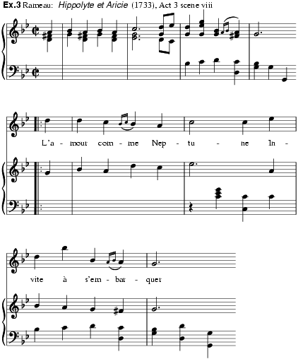 Rameau: Hippolyte et Aricie (1733), Act 3 scene viii.